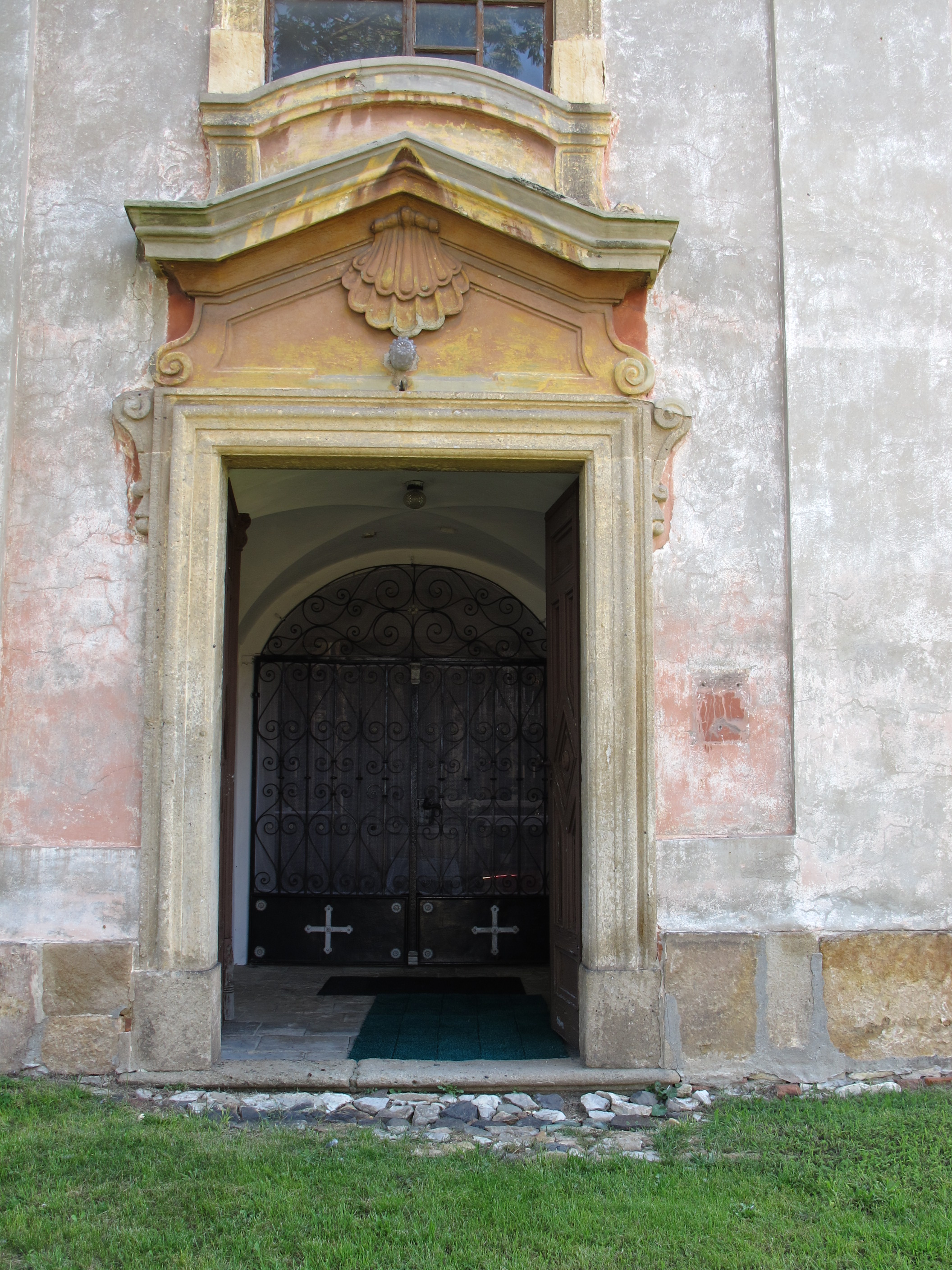 Kostel sv. Jiljí v Bečově, okres Most